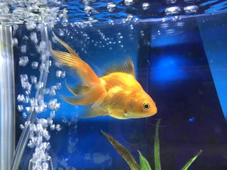 琉金(赤)の画像